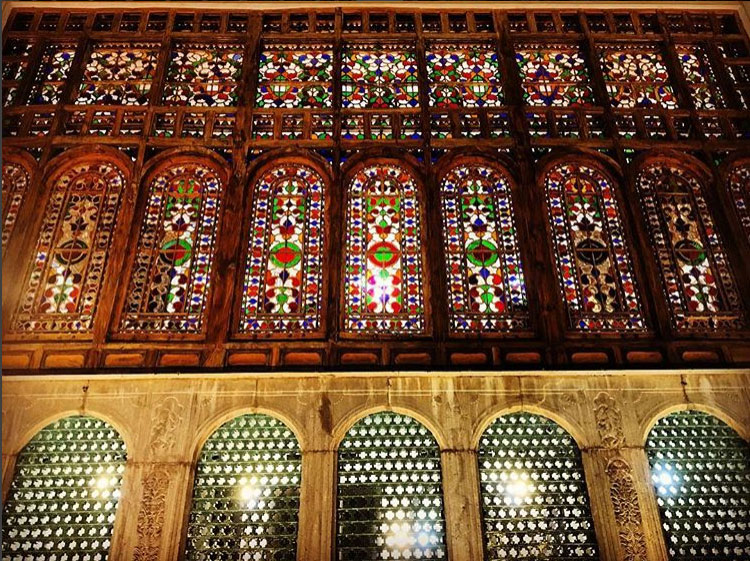 مرتفع ترین قسمت ساخت